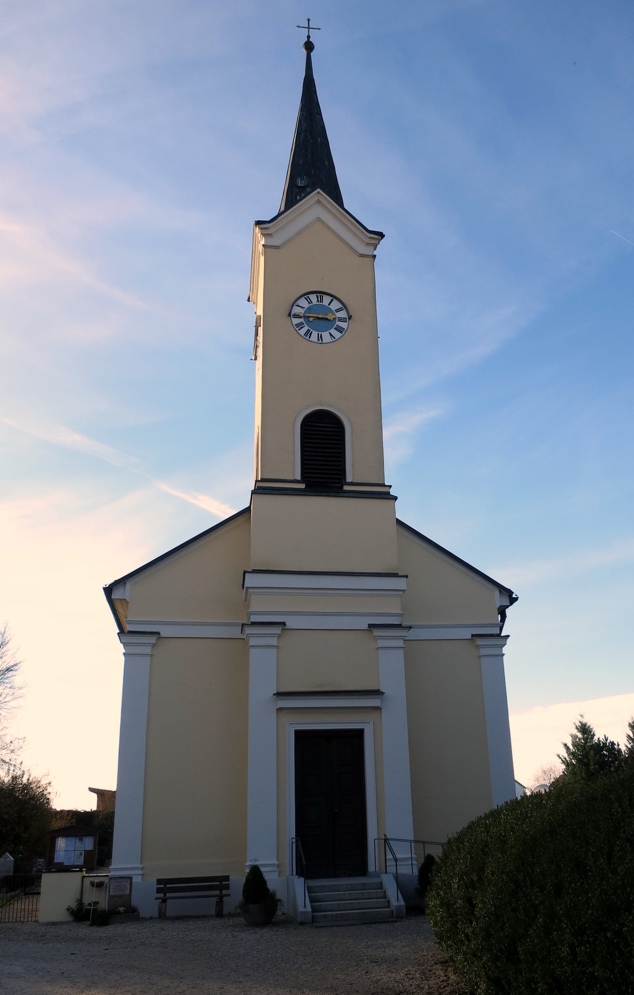 Turm ist in Fassade integriert